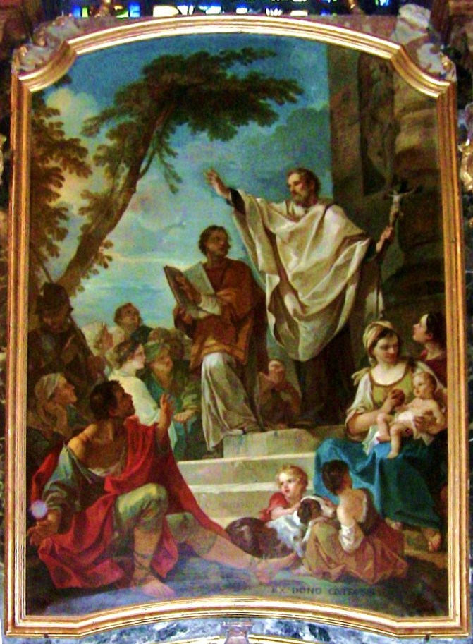 Tableau de la La Prédication de St Ferréol et de St Ferjeux.